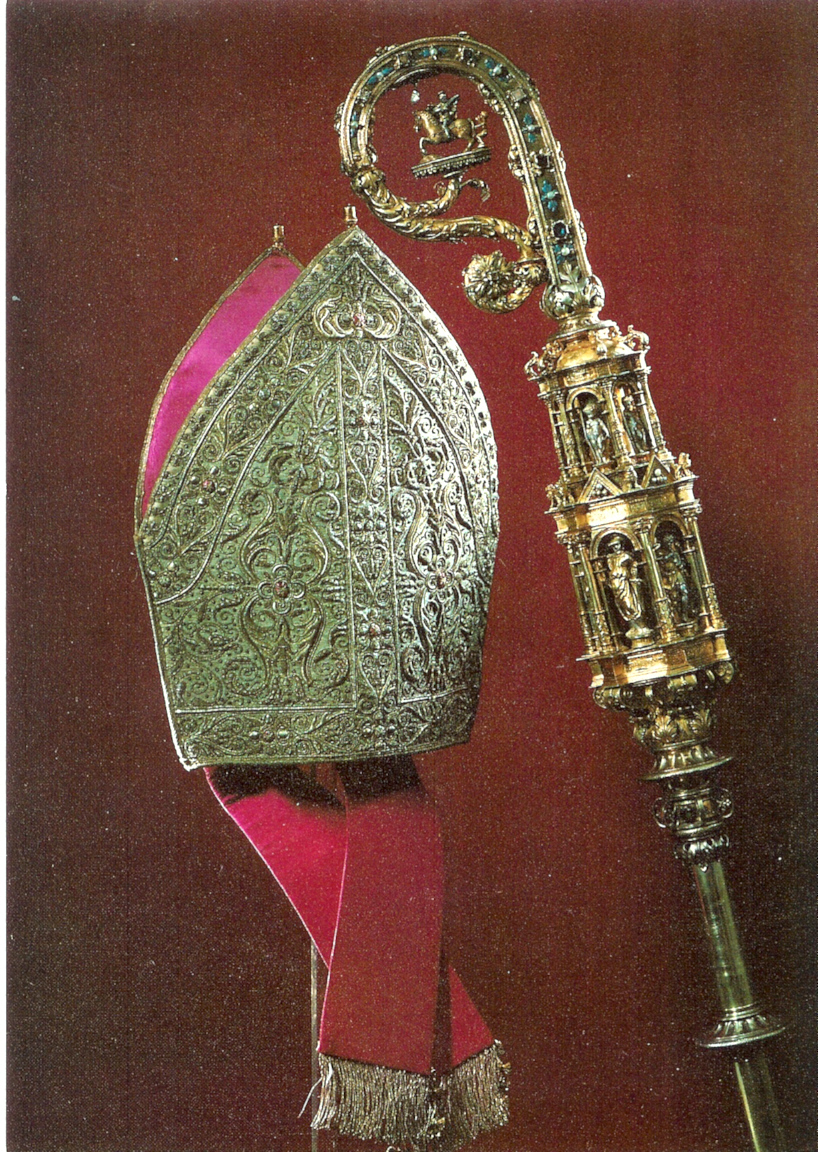 Mijter en staf van de eerste gemijterde abt, Coenraad van Malsen.